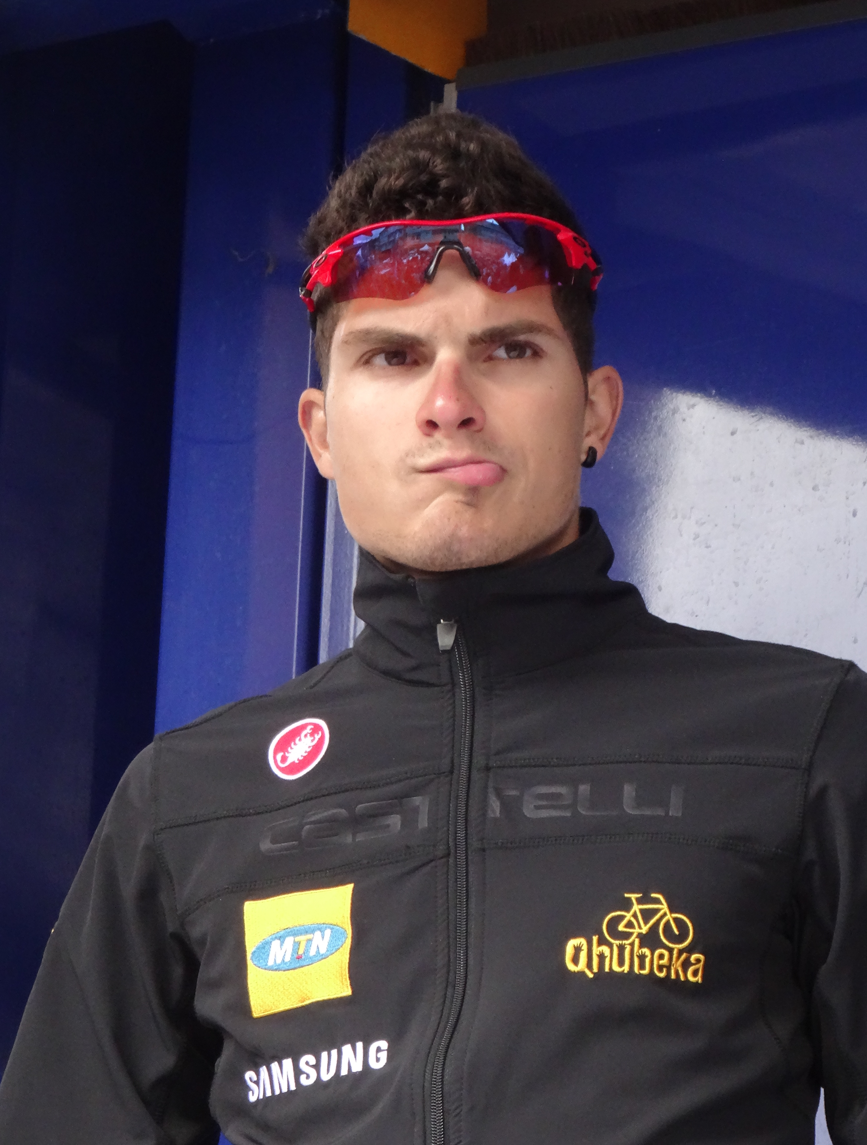 Reportage photographique réalisé le mercredi 7 mai 2014 au départ de la première étape de l'édition 2014 des Quatre jours de Dunkerque à Dunkerque, Nord, Nord-Pas-de-Calais, France. Depicted person: Kristian Sbaragli Depicted team: MTN-Qhubeka